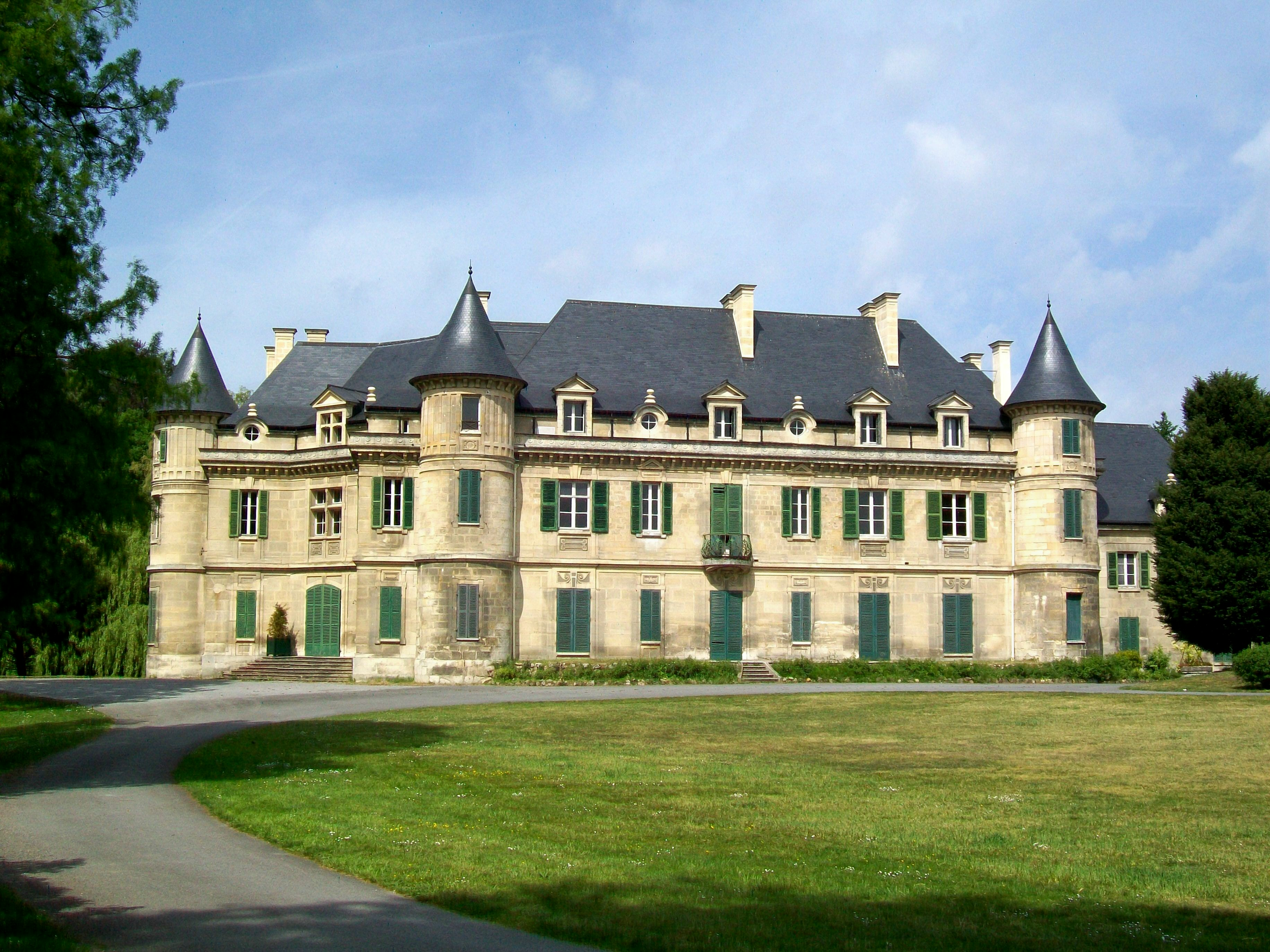 Le château de Lamorlaye, façade est.